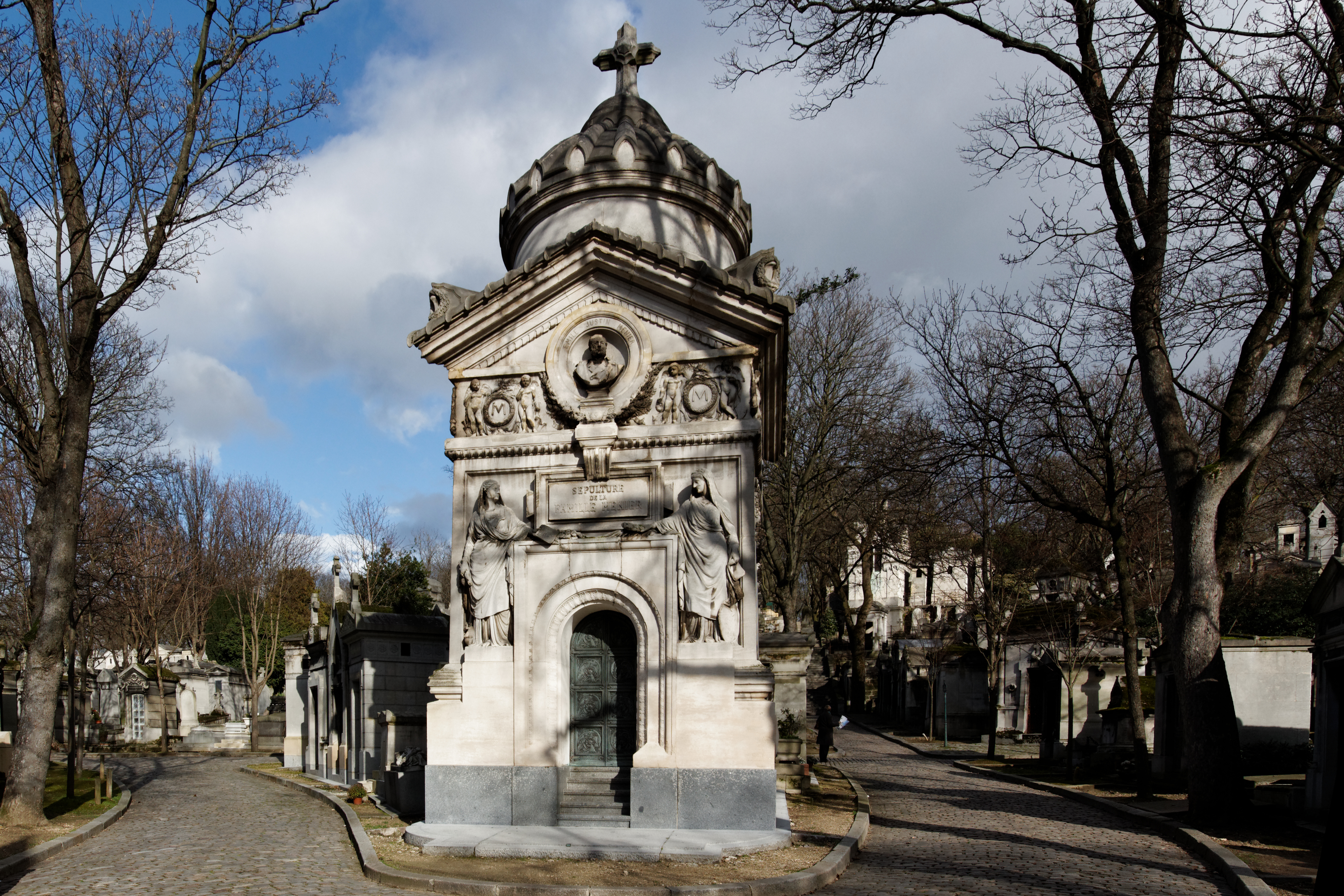 La veuve de Monsieur Menier fait l'acquisition successive d'une concession à perpétuité de 12,5 m² en 1881, de 17m² en avril 1882 et de 7m² supplémentaire en novembre 1887. La chapelle de 30m² et 12 mètres de haut est terminée en 1887. Chapelle à quadruple fronton dans laquelle un buste en marbre de Menier repose dans une niche située dans le fronton. Des cariatides entourent la porte. A gauche est représenté le Commerce et à droite l'Industrie. des bas-reliefs sont sculptés sous le fronton. Ils représentent deux génies et l'écusson gravé de la lettre M. La façade antérieure comporte la'inscription F. Gilbert sculpteur en bas à gauche. La porte en bronze est signée Thiébaut frères fondeurs.